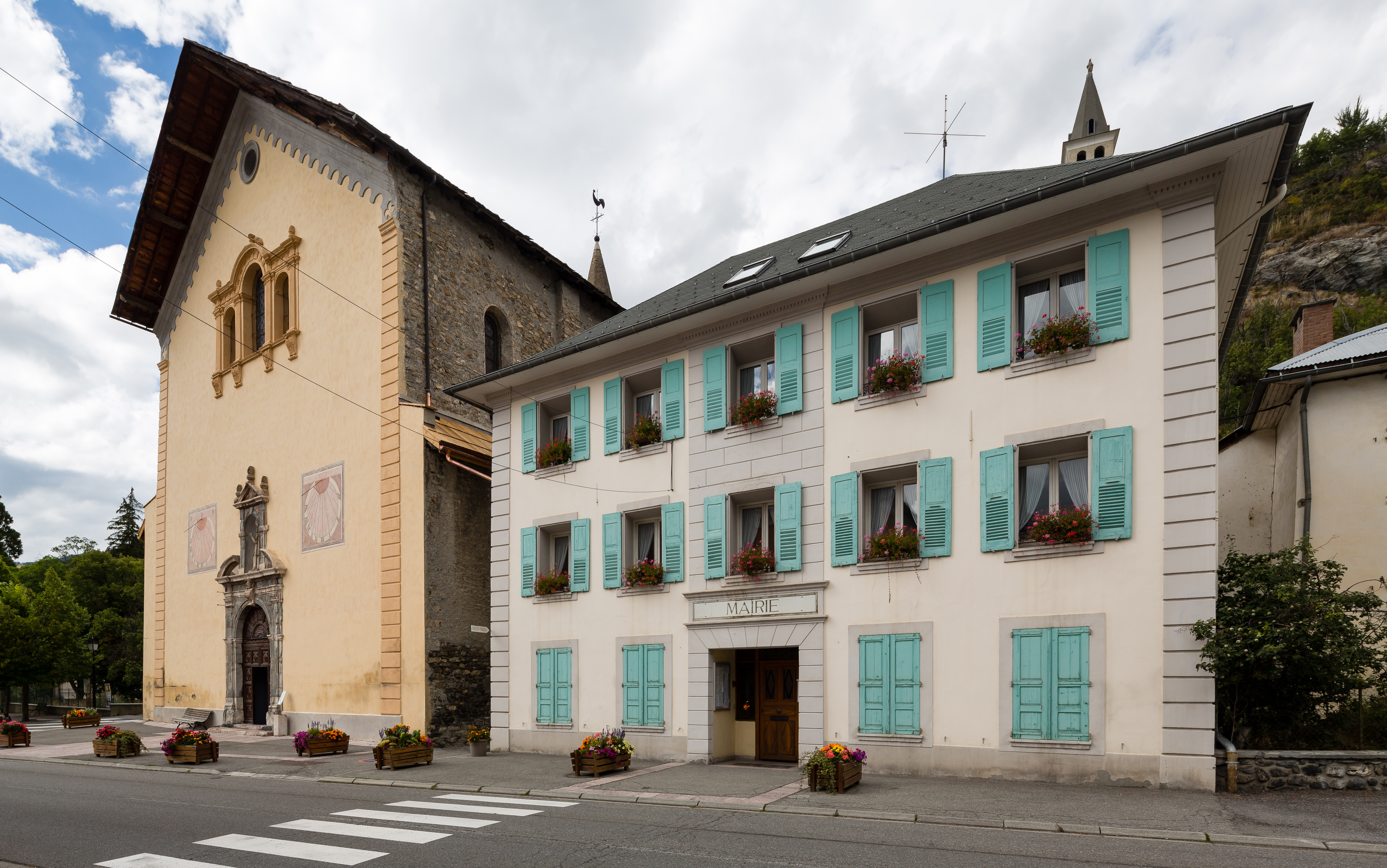 Mairie de Jausiers (France).